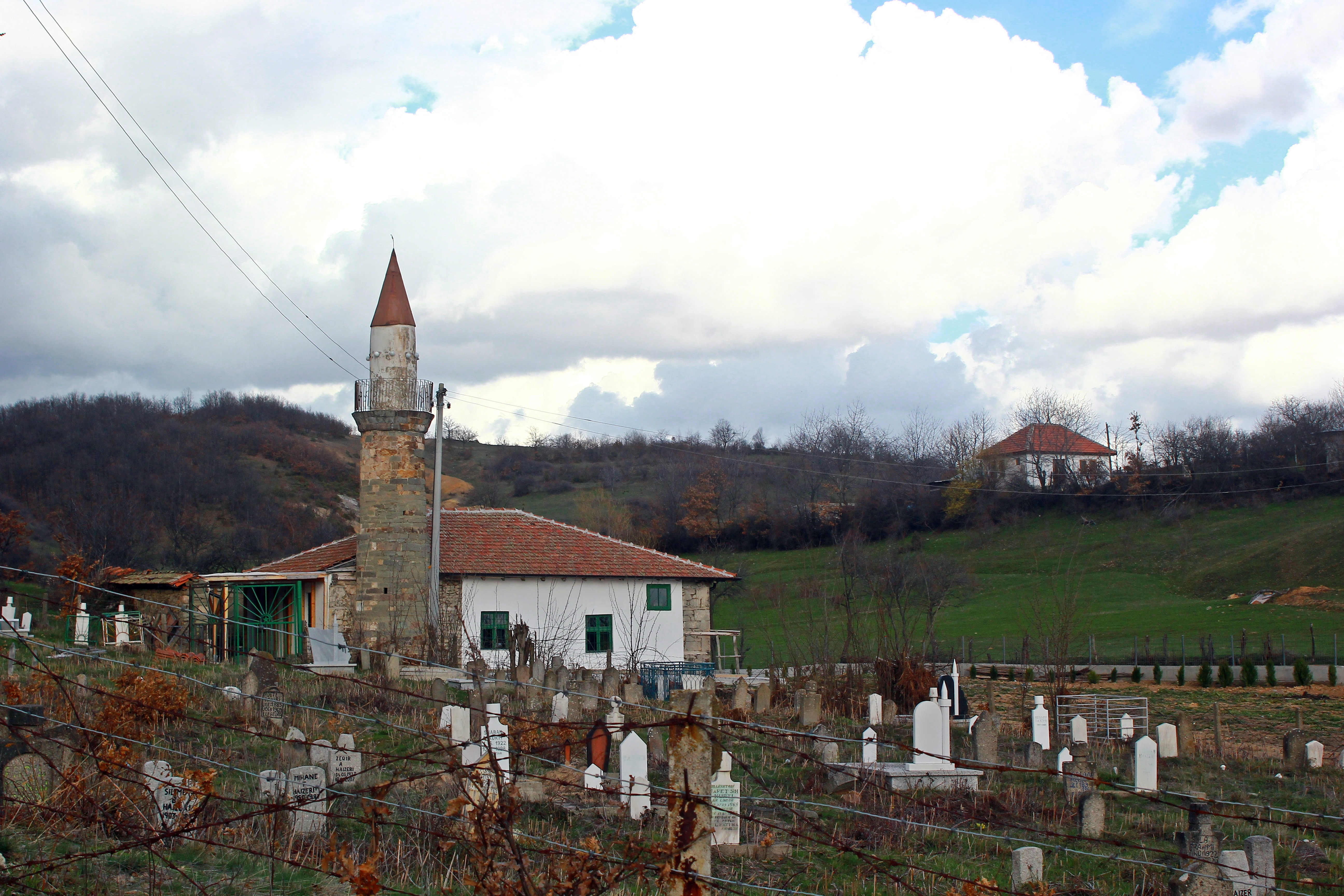 Xhamia në Vllahi